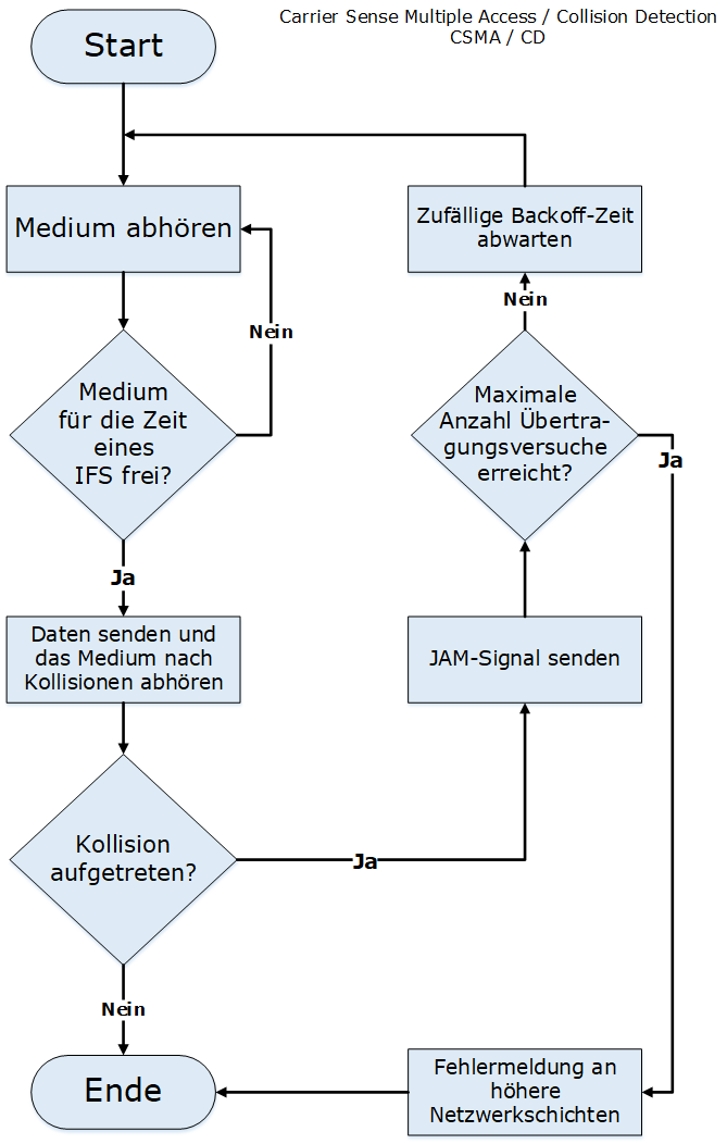 Ablaufplan zu CSMA/CD